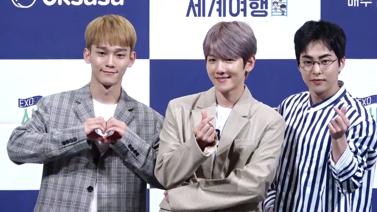 “삼인삼색 귀요미”... 첸백시, 러블리 뿜뿜 CBX 첸백시 (디패짤)